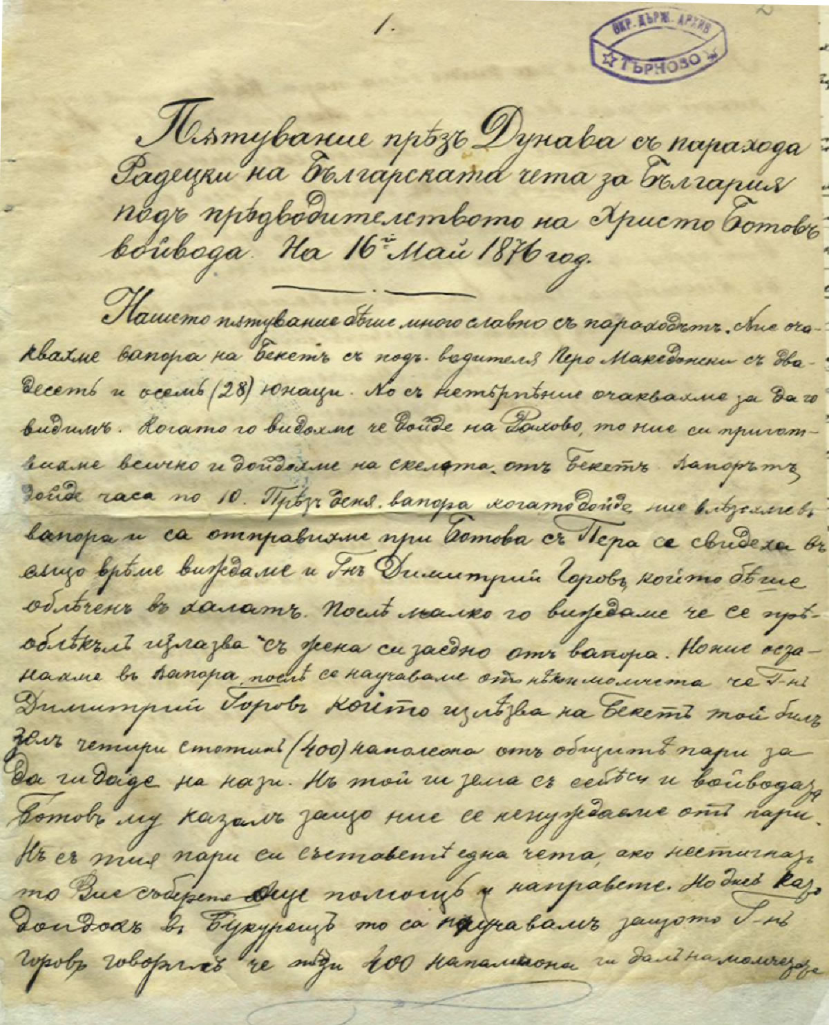 A page from the memories of Yordan Karshovski (1876) Страница от спомените на Йордан Кършовски (1876)